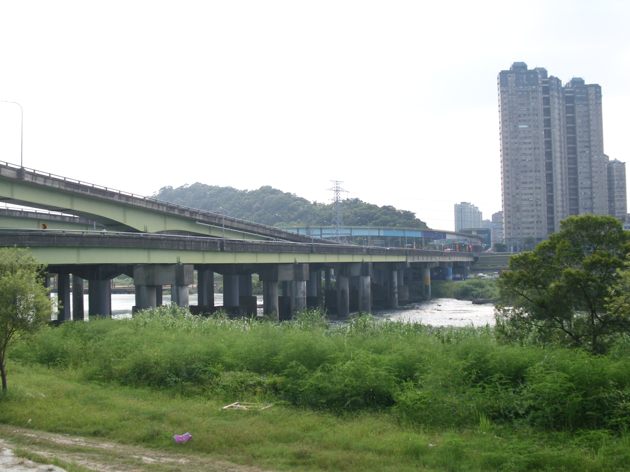 Bân-lâm-gú: 秀朗橋，這爿是新店，對面中和彼爿大樓是力霸山河大廈。